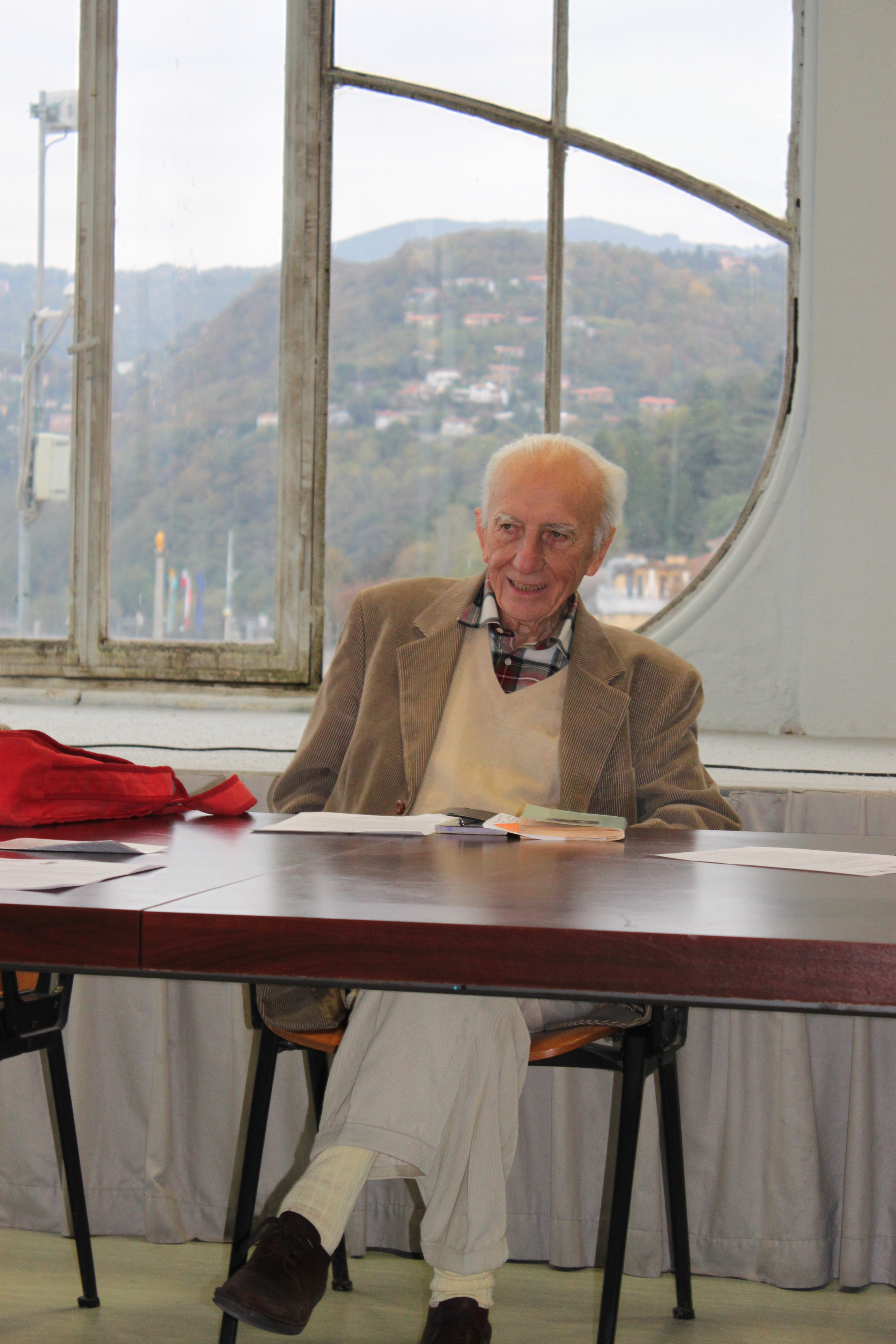 Seminario con Giancarlo Majorino